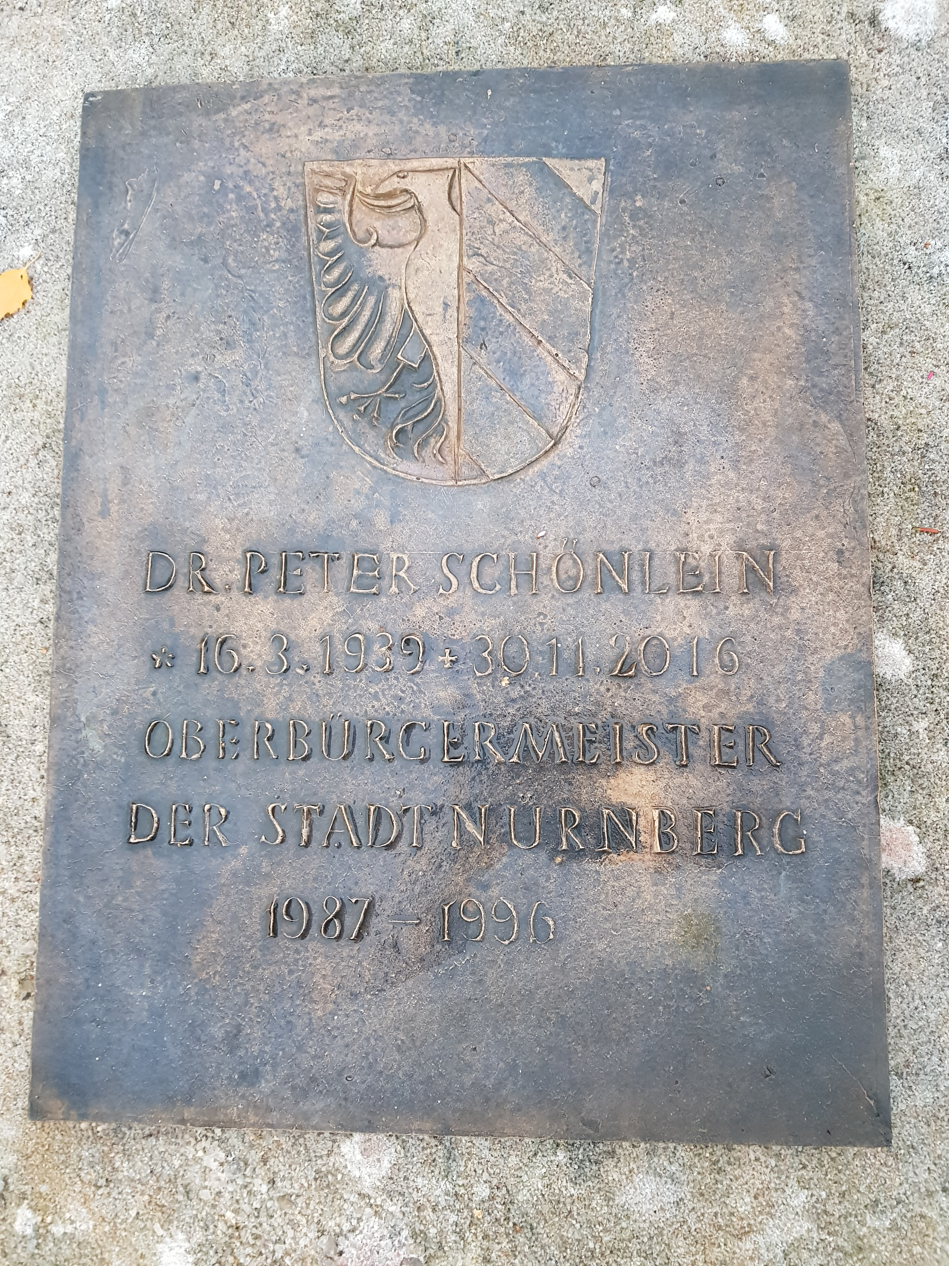 Grab des Nürnberger Oberbürgermeisters Peter Schönlein auf dem Rochusfriedhof, fotografiert ein knappes Jahr nach seinem Tod am Totensonntag 2017